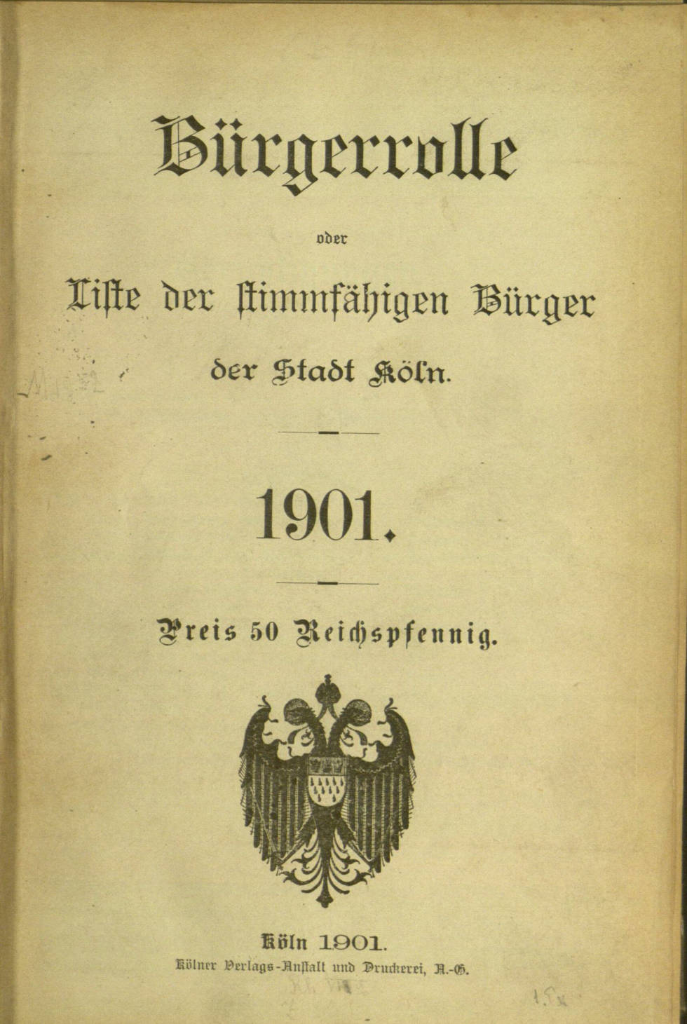 "Bürgerrolle oder Liste der stimmfähigen Bürger der Stadt Köln". 1901. Für die Wahlen zum Preußischen Landtag, mit Wählern in der I., II. und III. Abteilung.